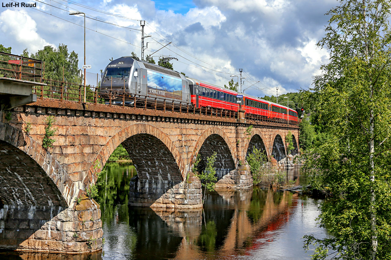 Dagtoget fra Oslo til Bergen på vei over Begna bru 15. juli 2020.